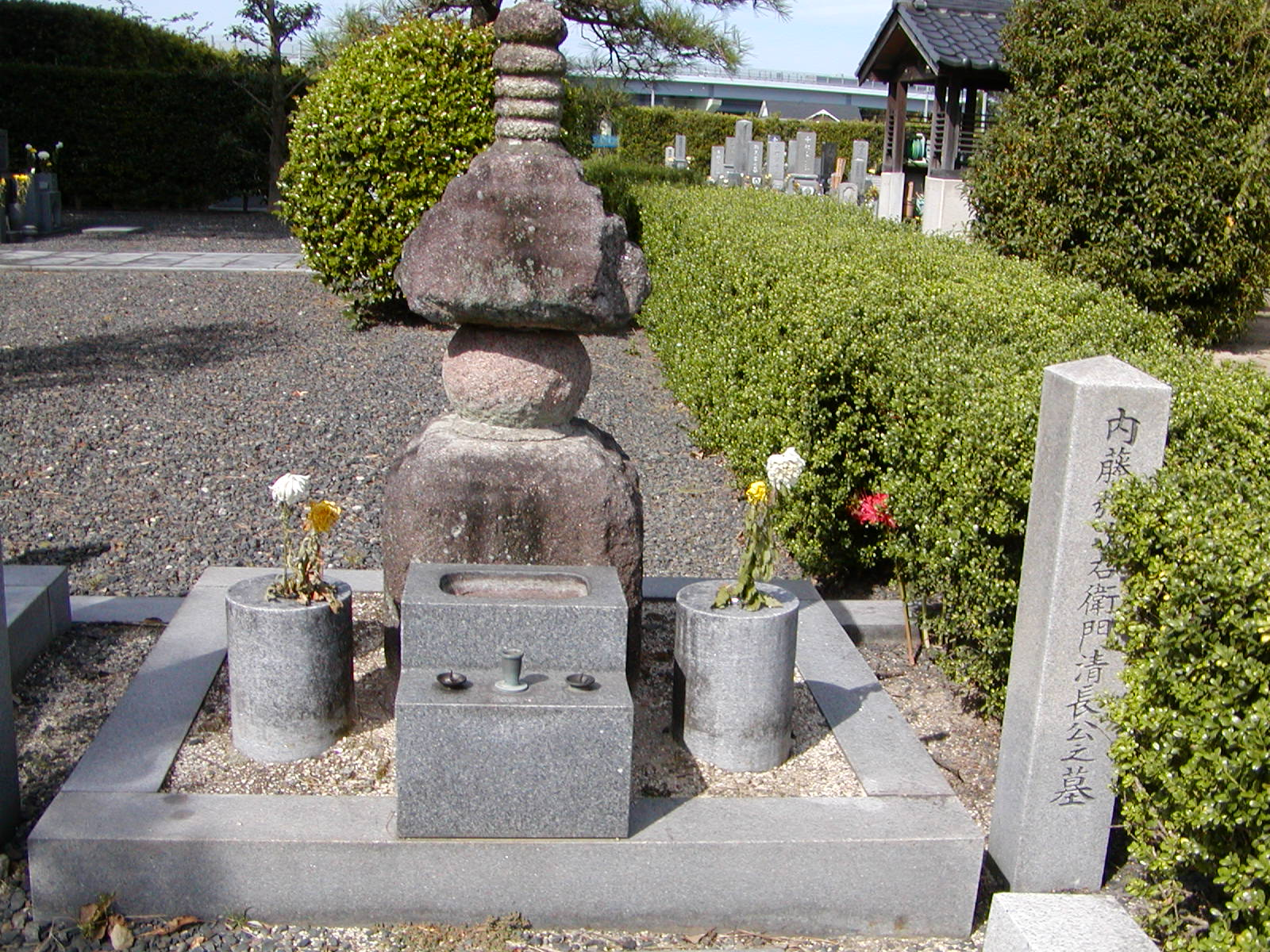 愛知県豊田市隣松寺 内藤清長墓